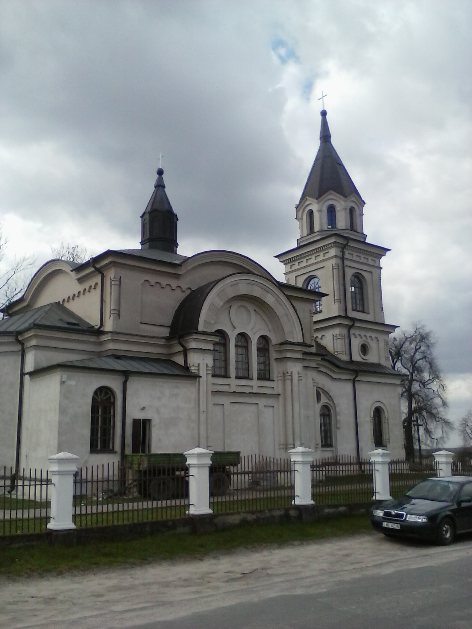 Kościół w Hańsku